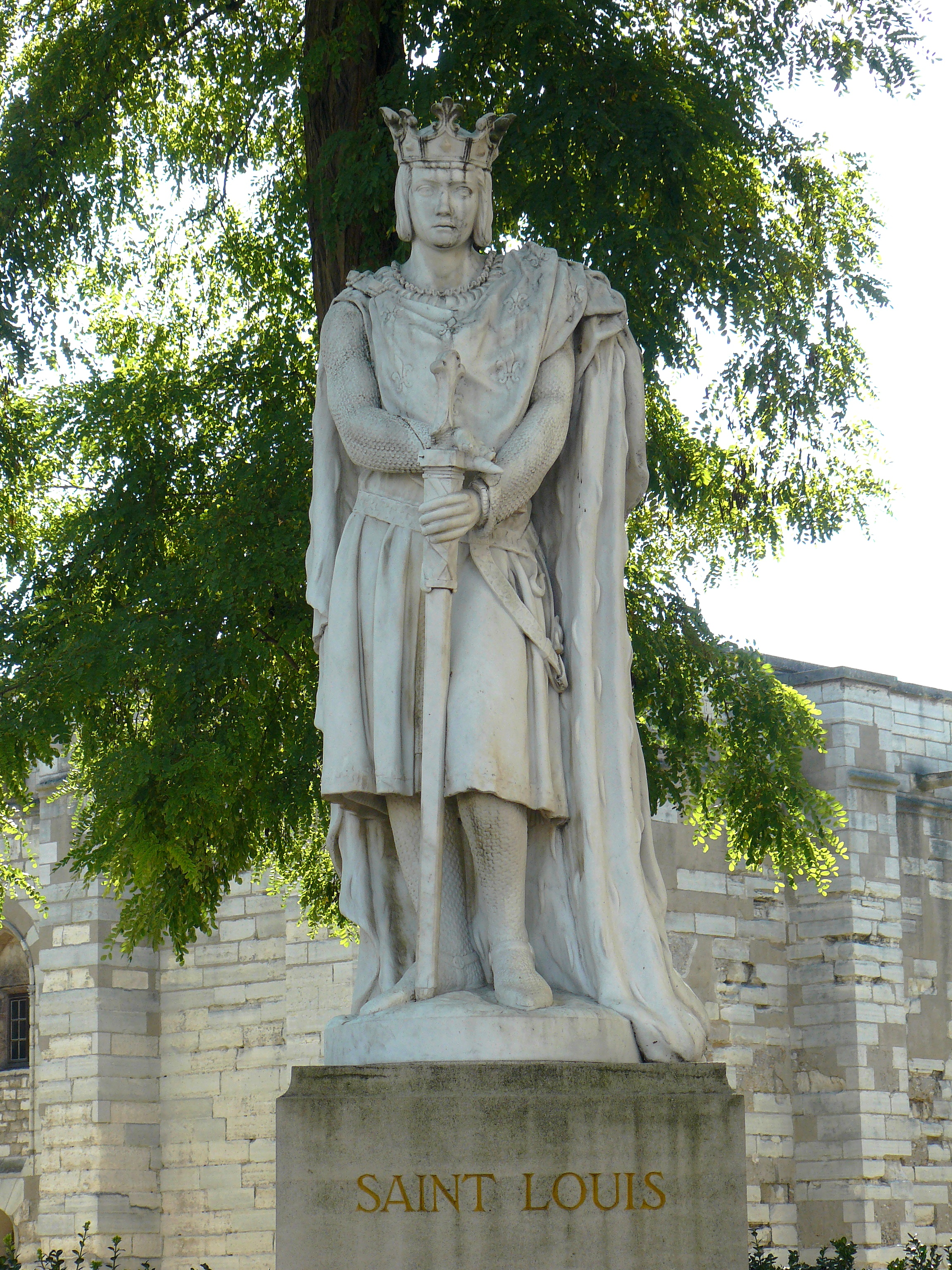 Statue en marbre de Saint-Louis (Louis IX), sculpture de A.Mony (1906). Déplacée de l'église de Saint-Louis-en-l'Île (île St Louis, Paris) et installé au coin Nord-Ouest extérieur de l'enceinte du château de Vincennes en 1971.